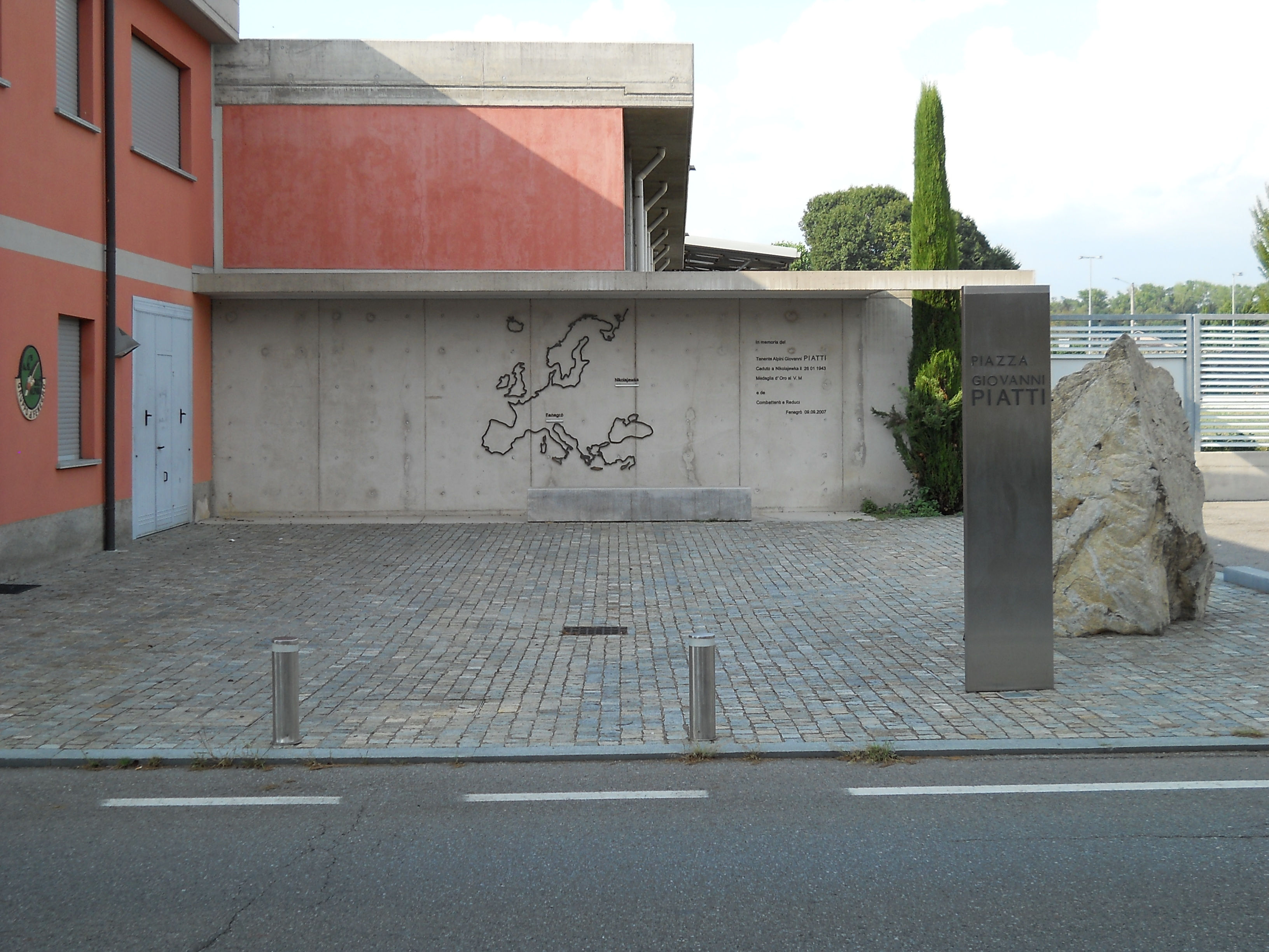 Piazza Giovanni Piatti, tenente di complemento degli alpini, fu decorato con Medaglia d'oro al valor militare alla memoria per il coraggio dimostrato in combattimento durante la Seconda battaglia difensiva del Don.